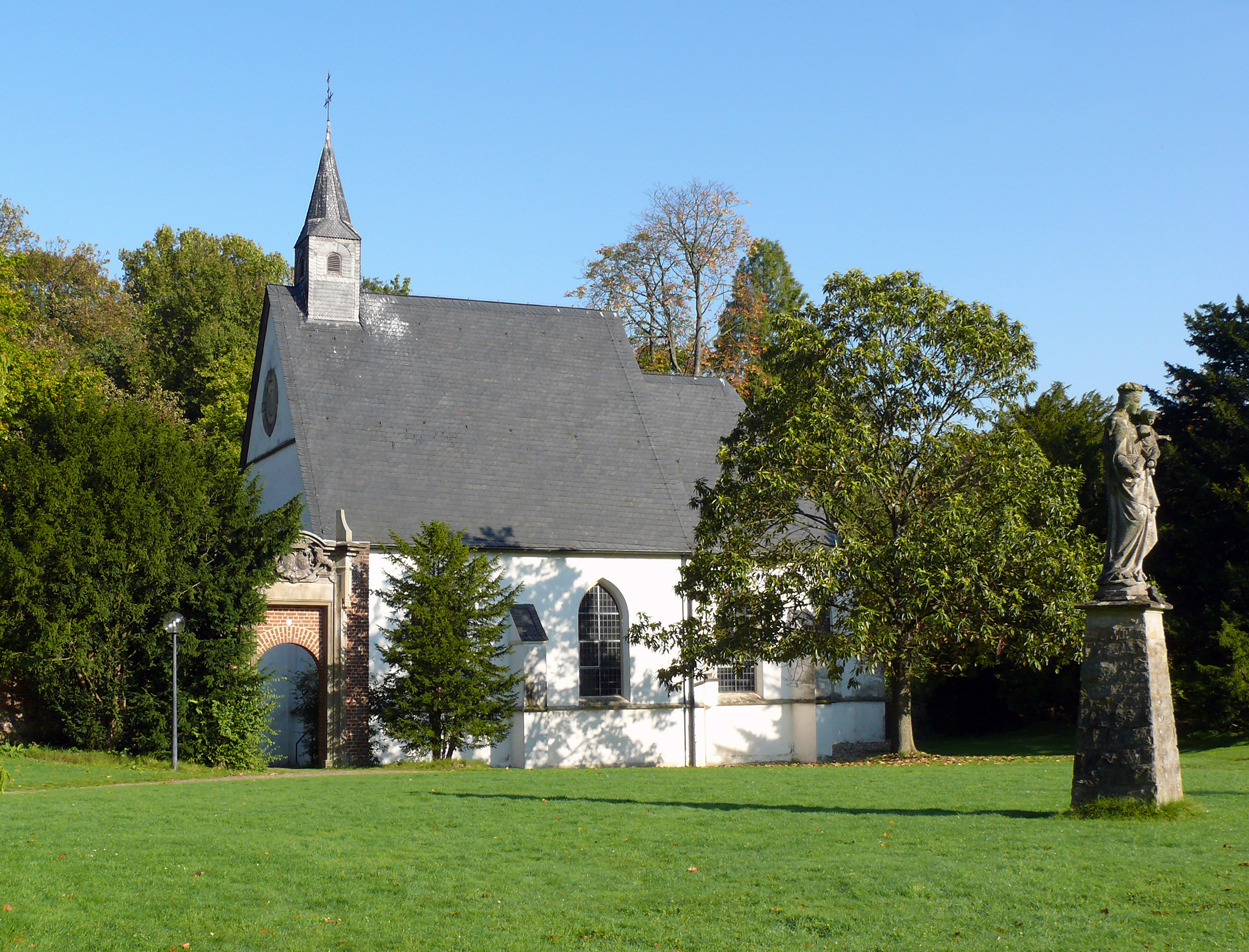 Schlosskapelle Herten, Südwestansicht